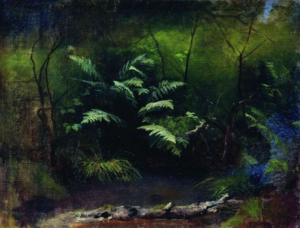 И. Левитан. Папоротники у воды. 1895 г.